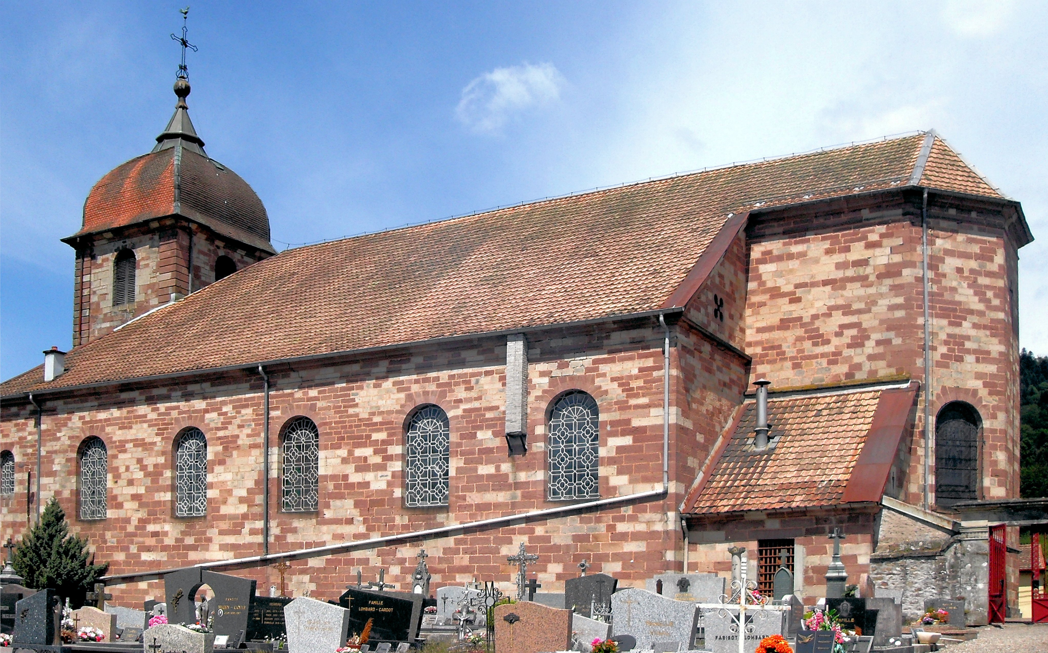 L'église Saint-Antide à Fresse